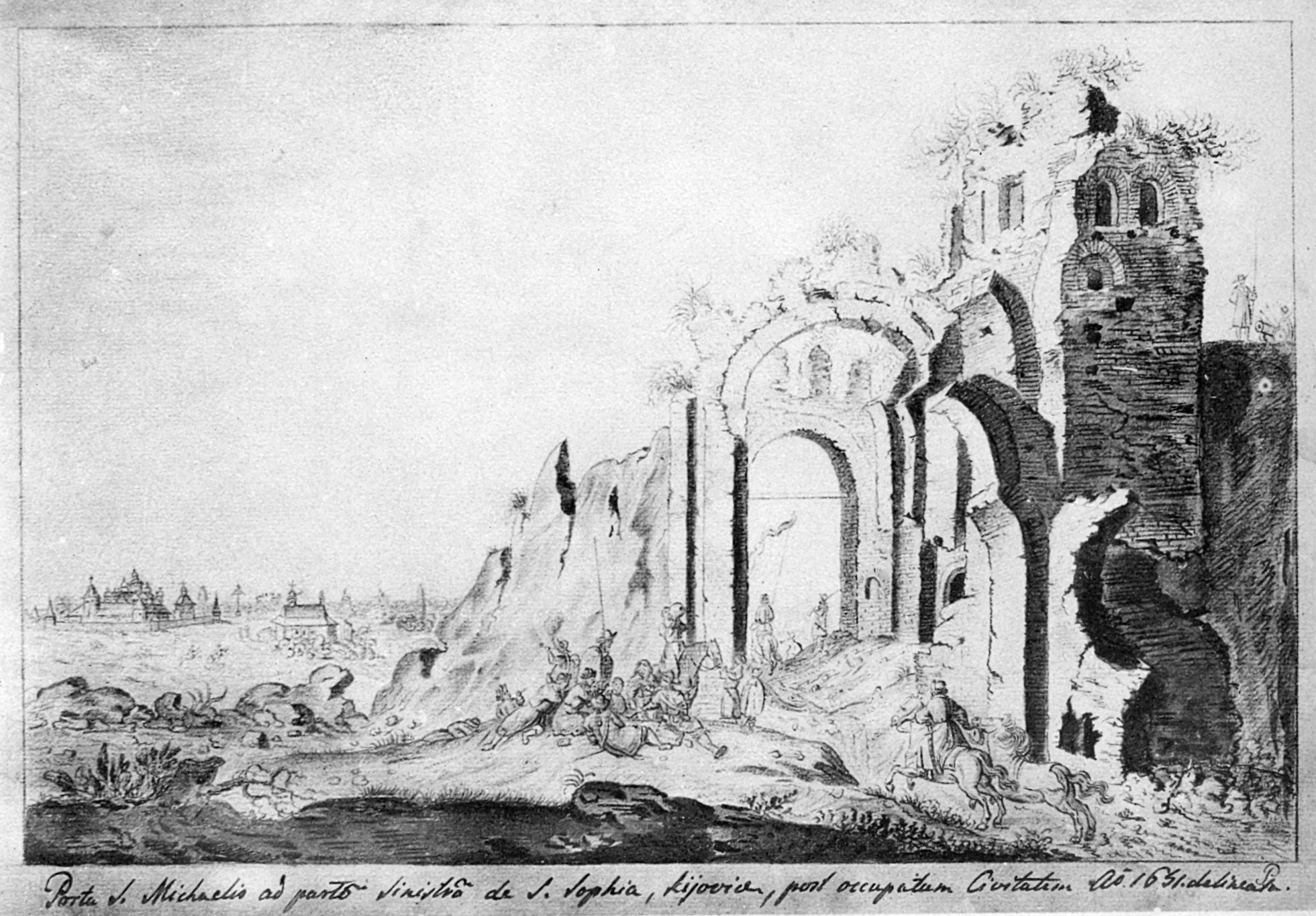 Золотые ворота с запада и общий вид на Св.Софию с юго-запада.